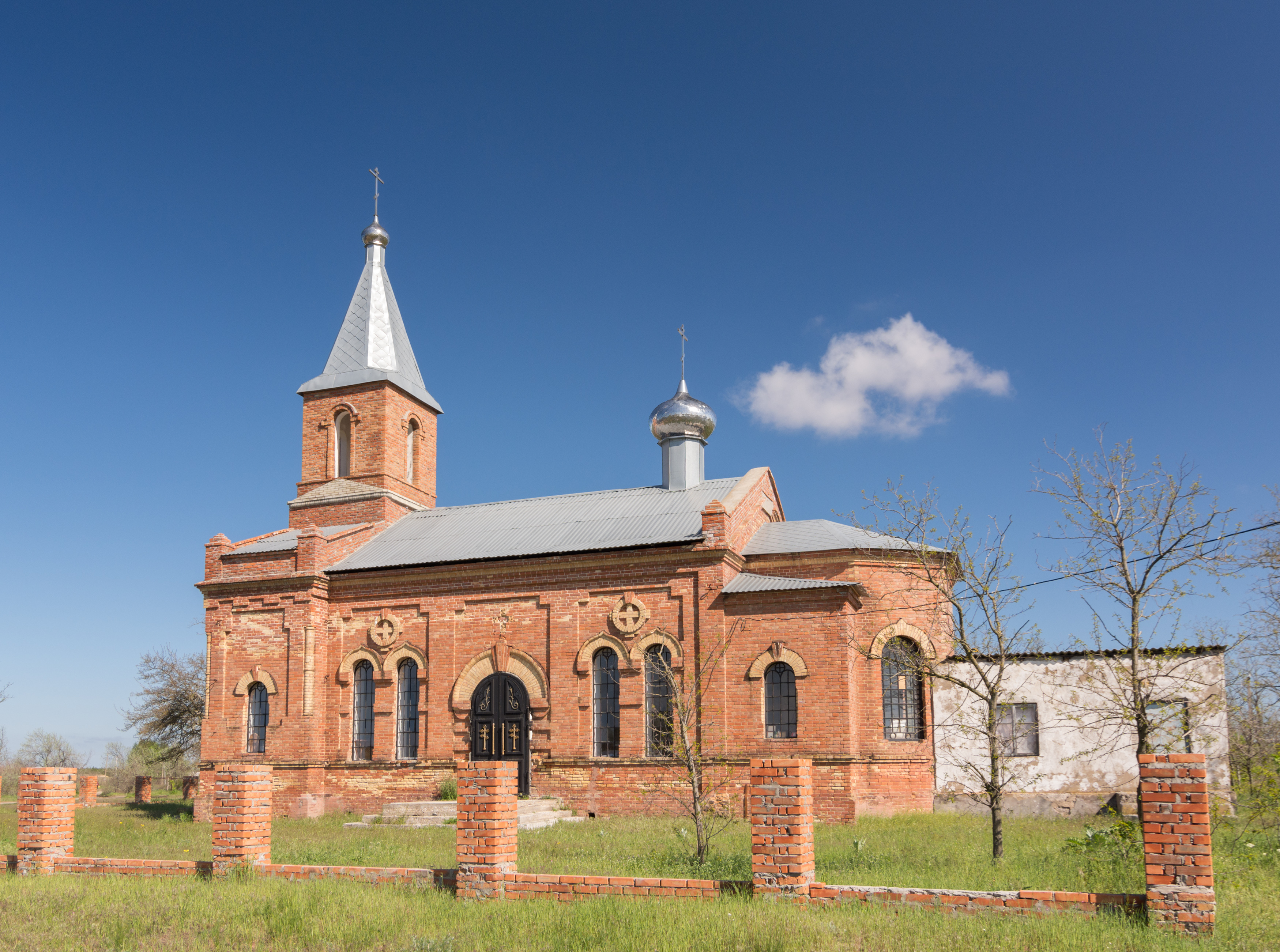 Храм Покрова Пресвятой Богородицы на Кинбурнской косе. Николаевская область, Украина